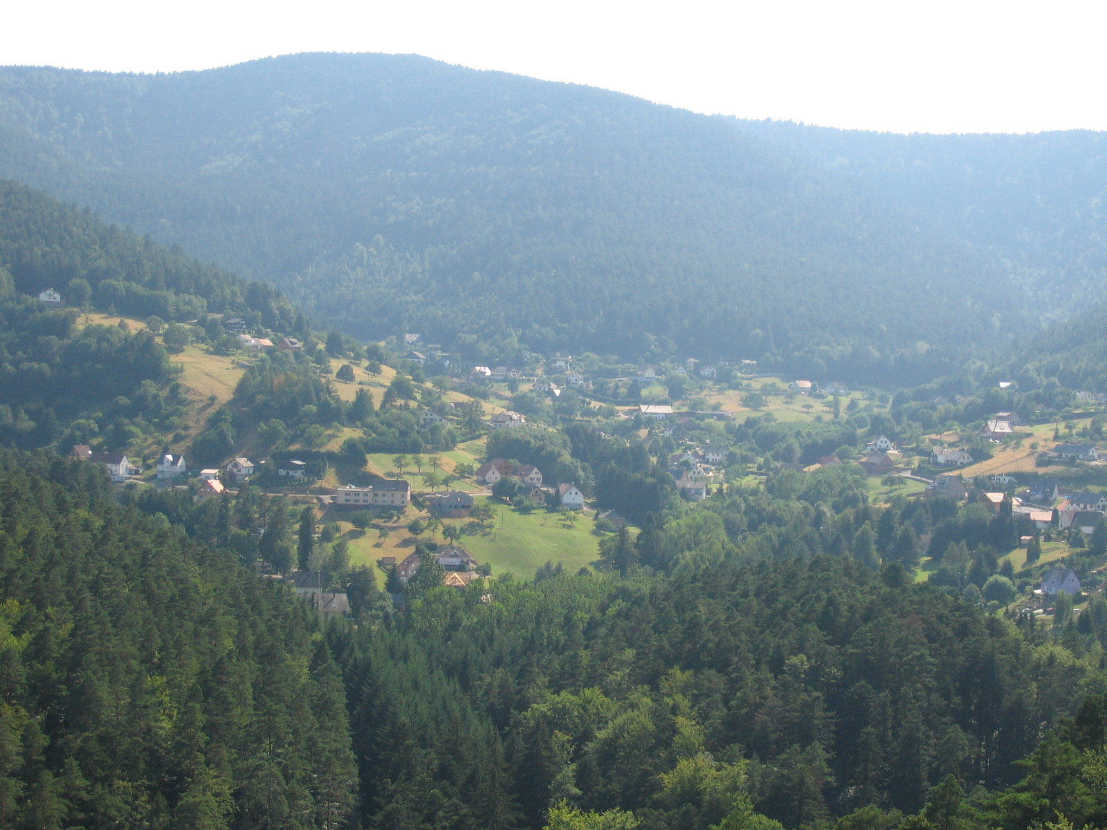 Les hameaux de Wangenbourg vus du château : les Huttes (à gauche) et Schneethal (au fond) dominés par le Schneeberg (961 m.)